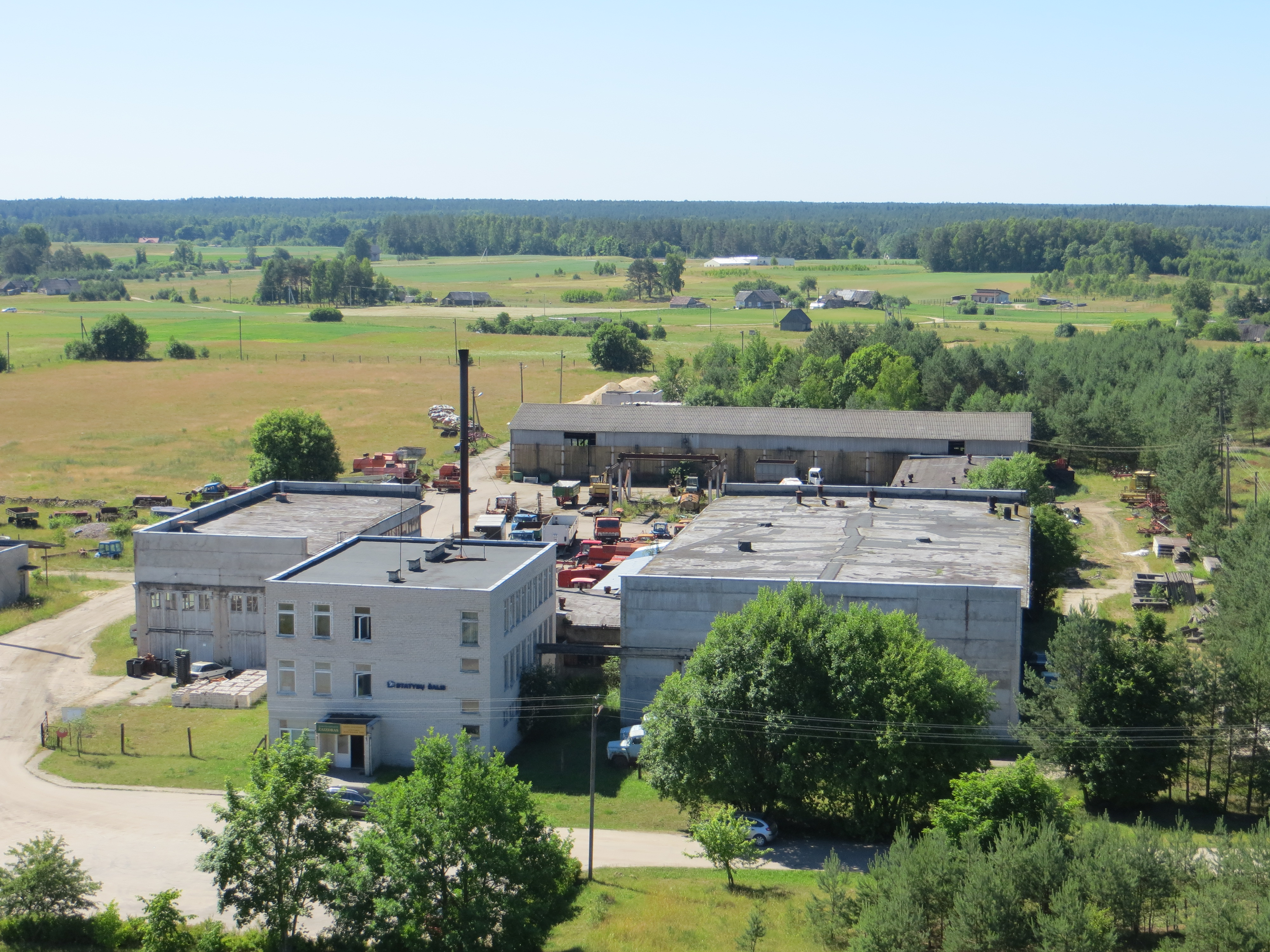 Žaizdriai, Lithuania